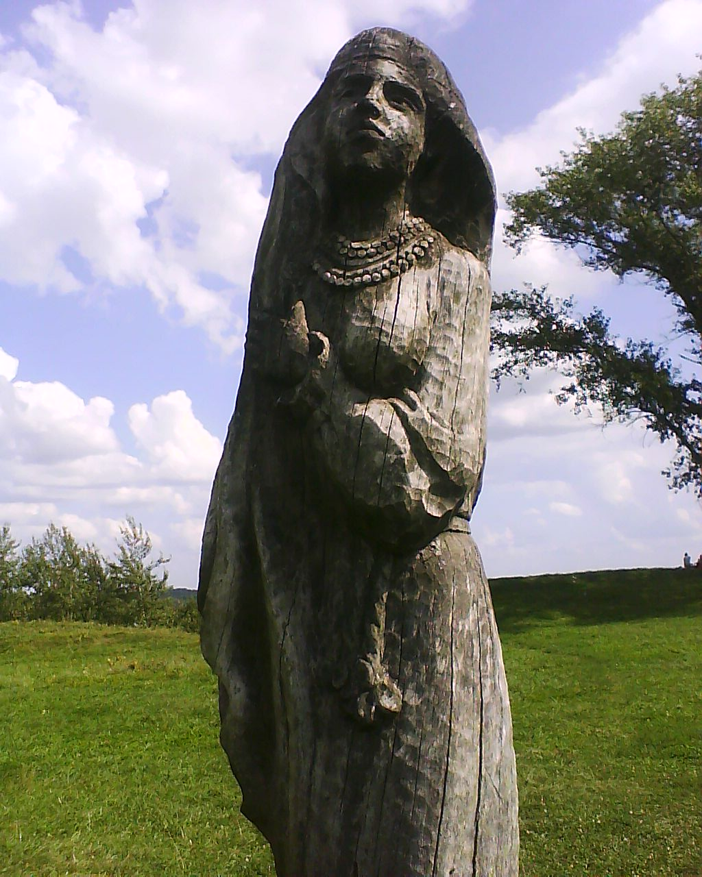 Гарадзішча. г. Браслаў This is a photo of Belarusian heritage monument. Reference number: 213В000174 ( WLM)